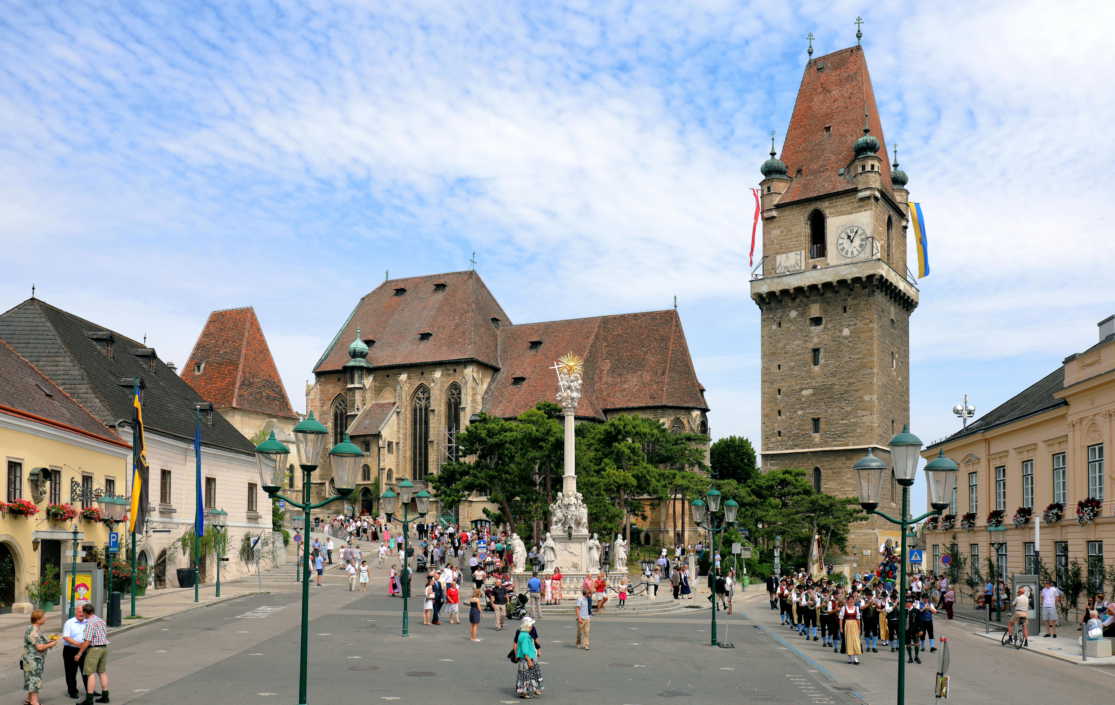 Der Marktplatz der niederösterreichischen Marktgemeinde Perchtoldsdorf. Links das sogenannte Regenharthaus, ein Bürgerhaus mit einer Kernsubstanz aus dem 15. Jahrhundert und hinter diesem die Martinskapelle bzw. der ehemalige Karner mit dem steilem Keildach. In der Bildmitte die Pfarrkirche hl. Augustinus und vor dieser die barocke Dreifaltigkeitssäule. Rechts der Wehrturm, ein von 1450 bis 1521 erbauter fünfgeschoßiger Turm, und ganz rechts das Gemeindeamt, ein ehemaliger späthistoristischer Meierhof aus dem Jahr 1838. Die Aufnahme wurde am Perchtoldsdorfer Fronleichnamstag gemacht, der gegenüber dem „regulären“ Fronleichnamstag um 10 Tage später gefeiert wird.